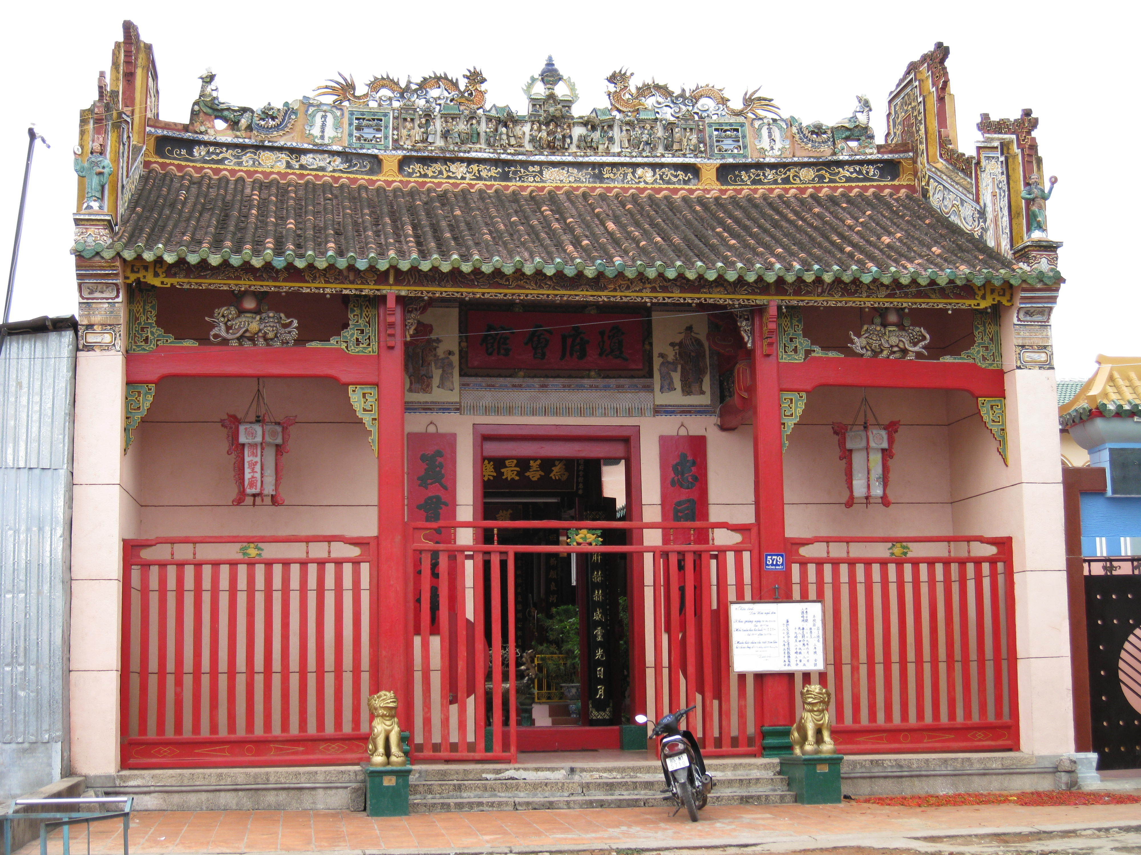 Chùa Ông tại Phan Rang-Tháp Chàm.